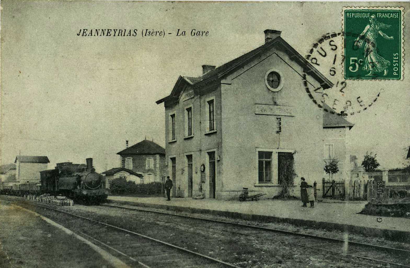 Carte postale ancienne éditée par GLD, n°1043 : JANNEYRIAS - La Gare (Chemin de fer de l'Est de Lyon)